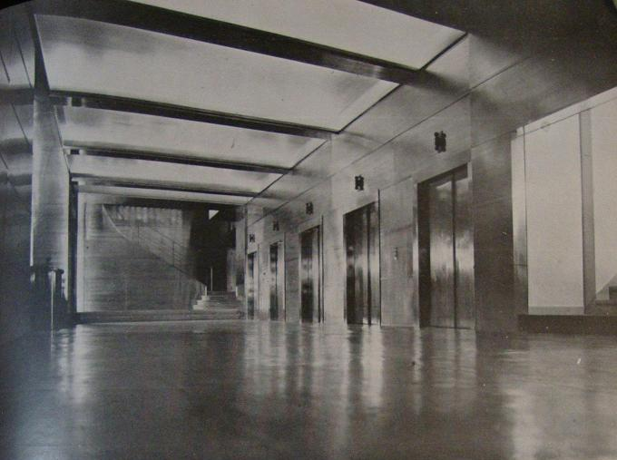 Vista del hall de la planta baja del Edificio Comega, y acceso a los ascensores y escalera principal. Uno de los primeros "rascacielos" racionalistas de Buenos Aires. Avenida Corrientes esquina Leandro N. Alem.